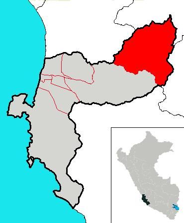 Ubicación del distrito de Huancano , en la provincia de Pisco , en la Región Ica.